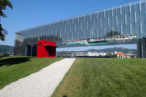 Lentos Kunstmuseum Linz